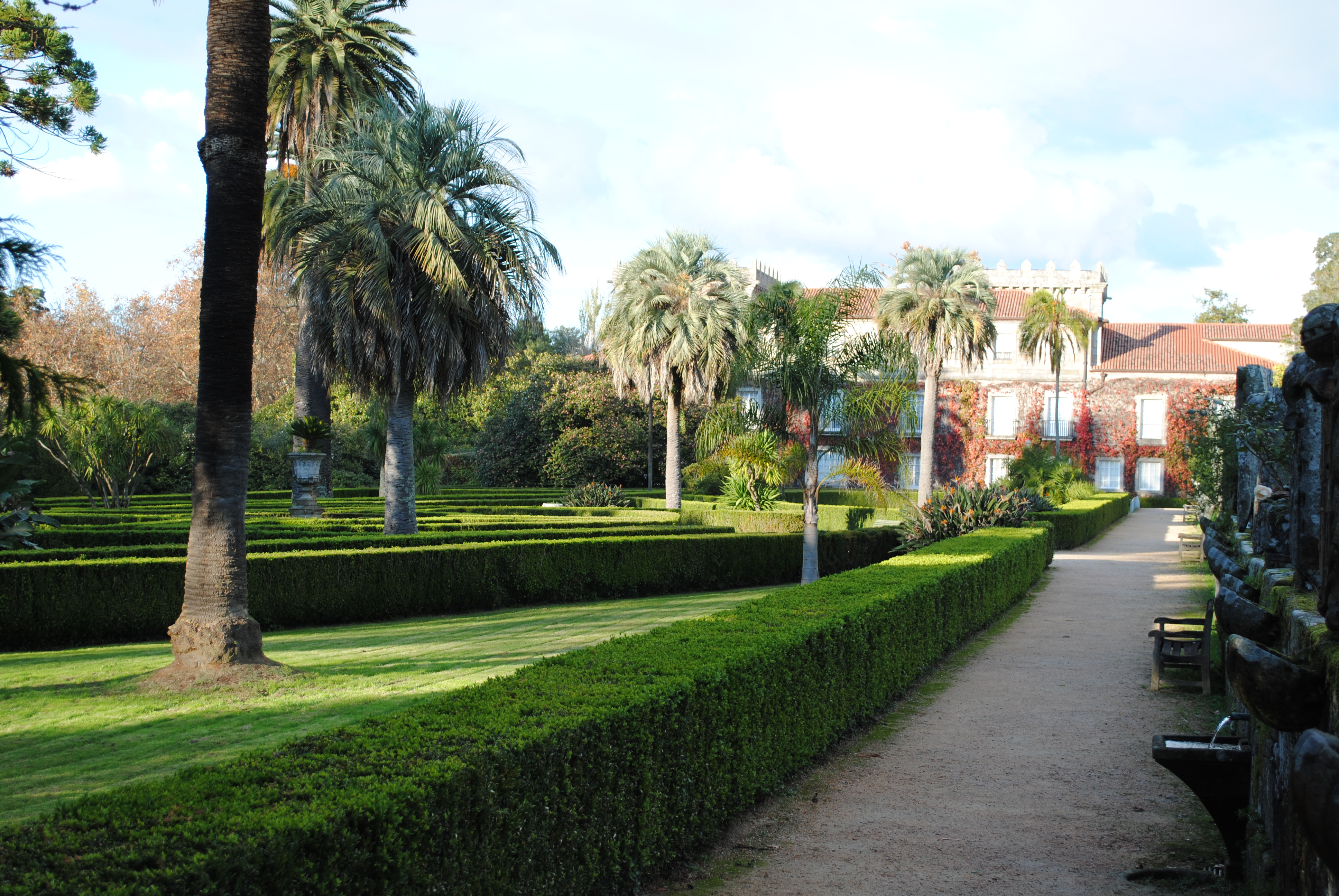 Pazo de Castrelos, xardín francés